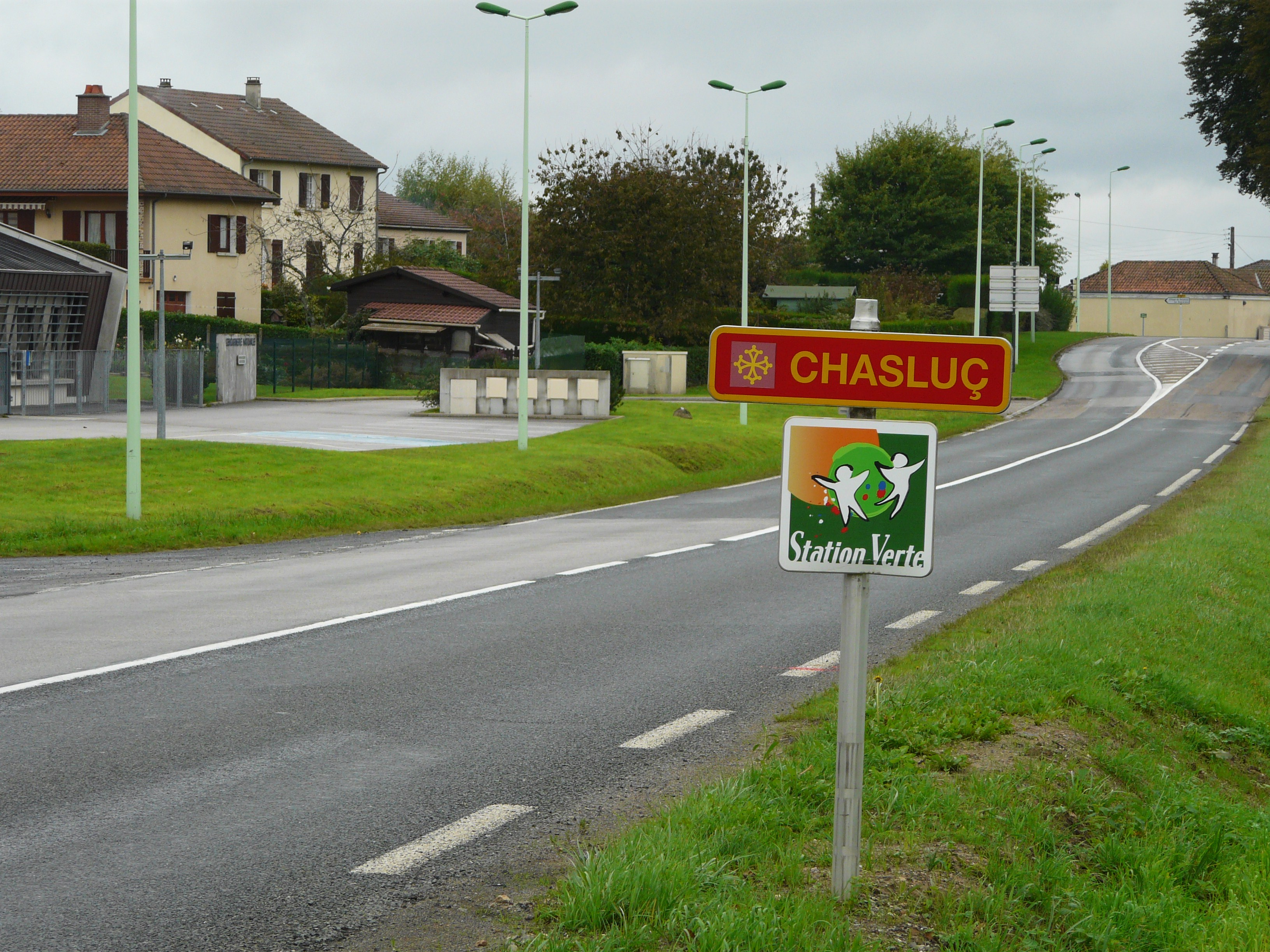 Panneau d'entrée (en occitan limousin) à Châlus, Haute-Vienne, France.